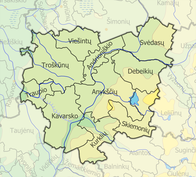 Anykščių rajono savivaldybės seniūnijos (lt::File:LietuvosSeniunijos.png)